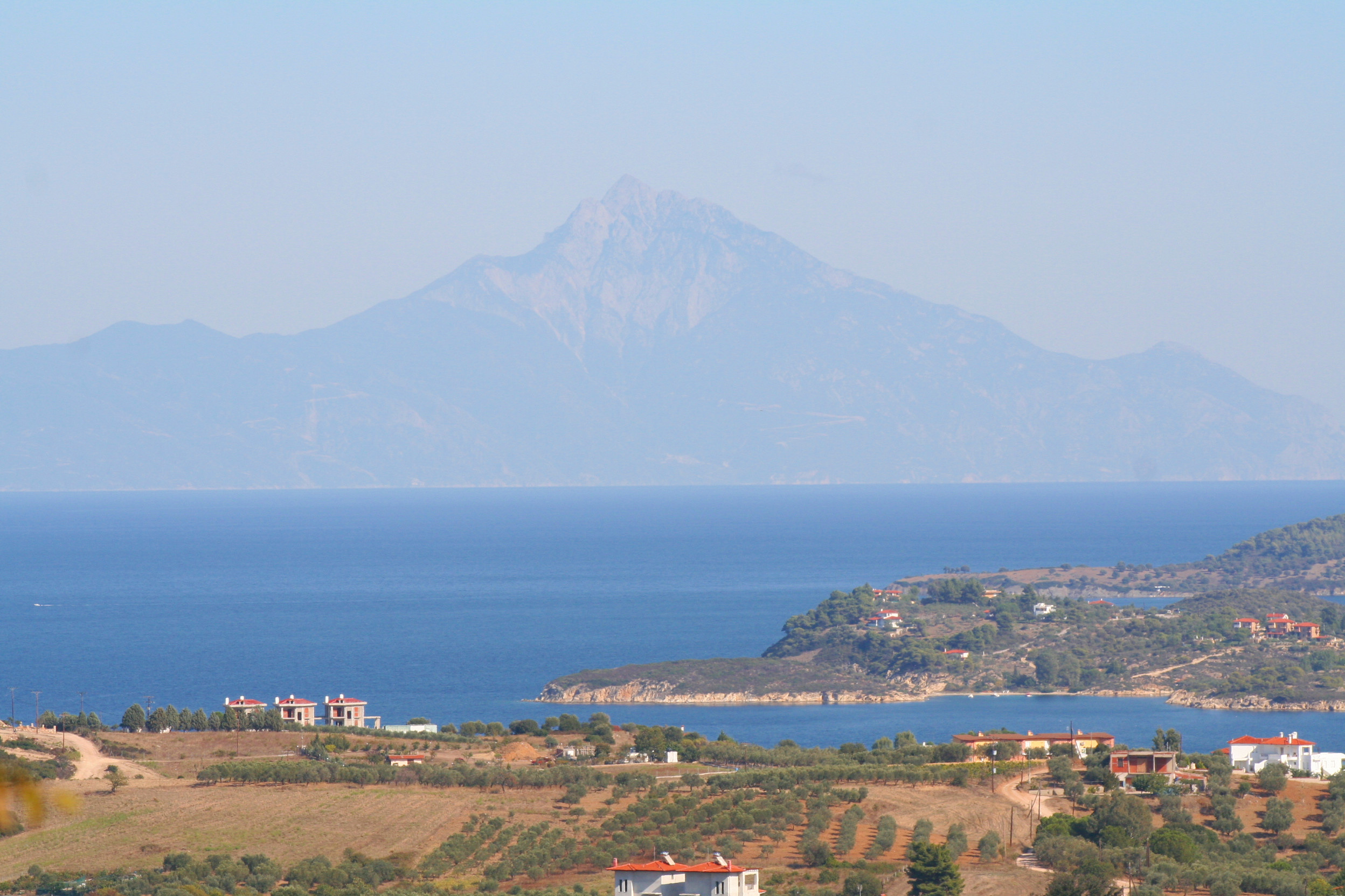 Blick von Ágios Nikólaos aus in südöstliche Richtung auf Panaghiá und Berg Áthos.